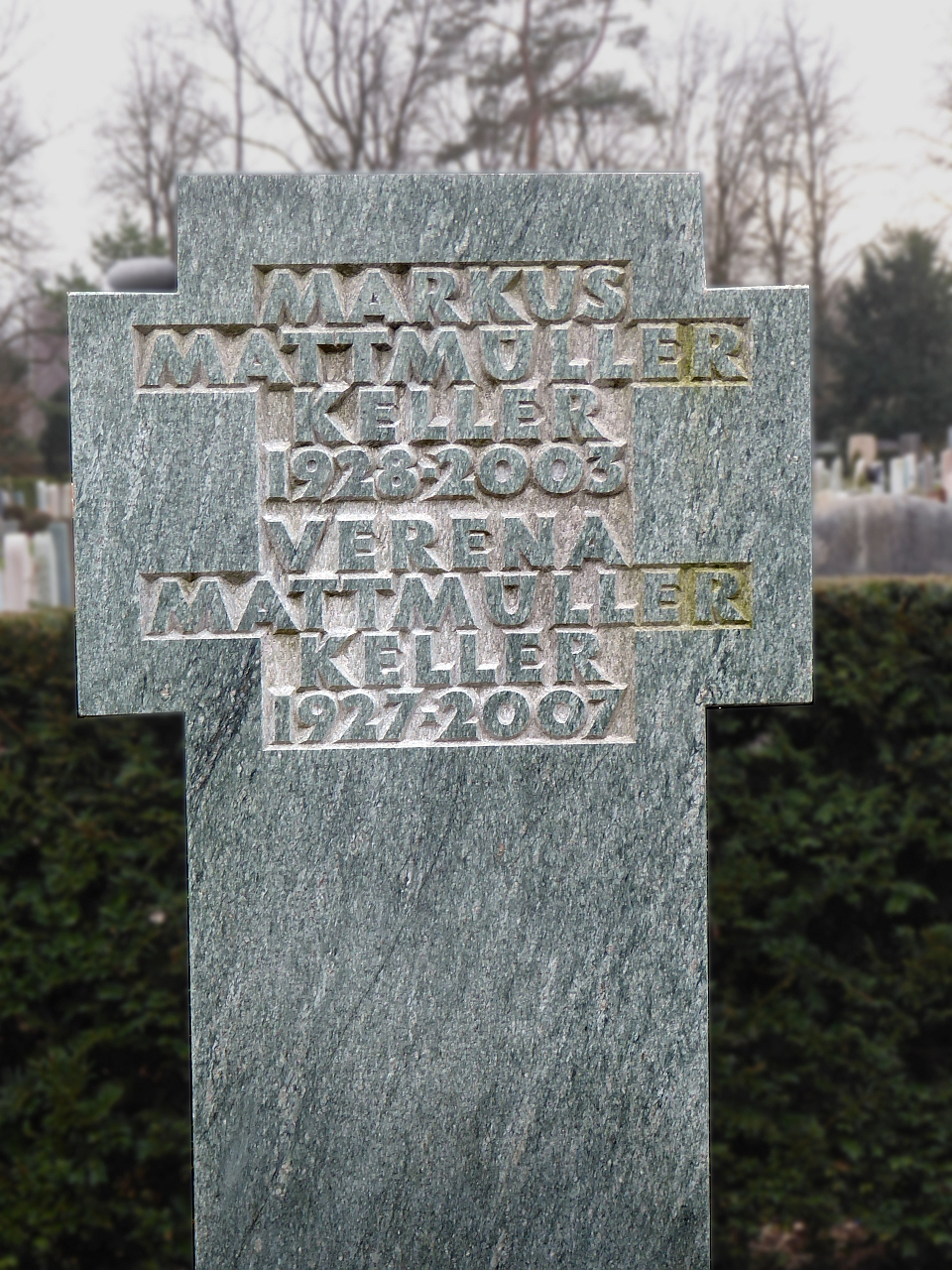 Markus Mattmüller-Keller (1928–2003), Lehrer, Dr.phil., Historiker, Studien zu Demografie und Agrargeschichte im Ancien Régime. Grab auf dem Friedhof Hörnli, Riehen, Basel-Stadt